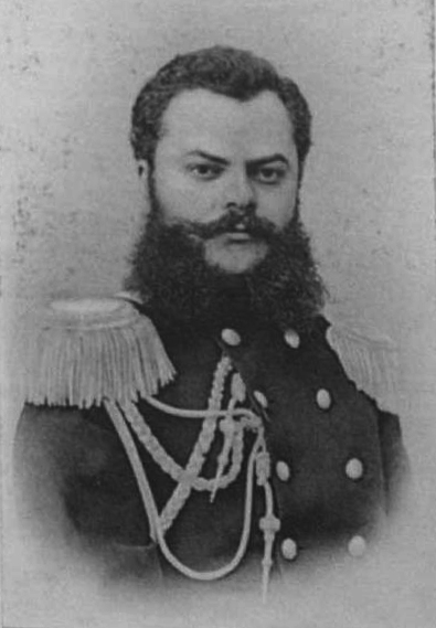 Граф Павел Ипполитович Кутайсов (1837—1911)